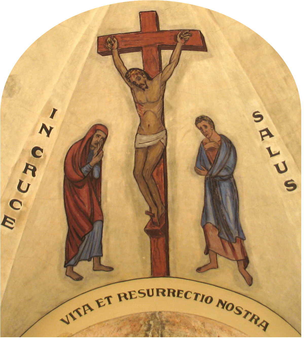 Sujet: Molerei um Plafong vun der Kierch zu Rëmerschen.